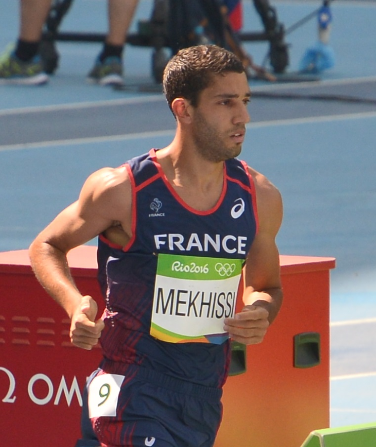 Mahiedine Mekhissi au 3000m steeple des JO de Rio 2016